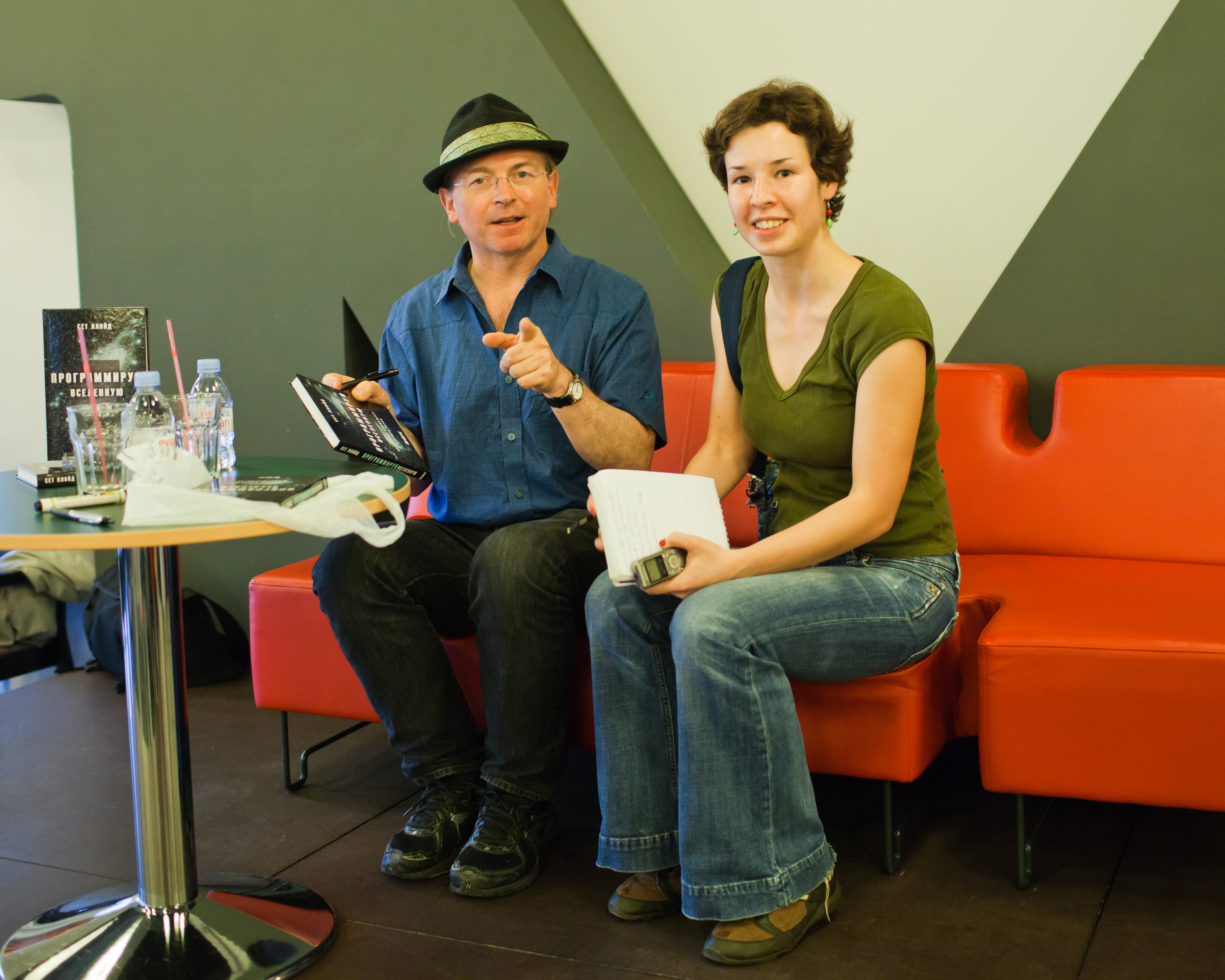 Сет Ллойд на презентации книги "Программируя Вселенную" (Москва, книжный магазин "Москва" на Воздвиженке)